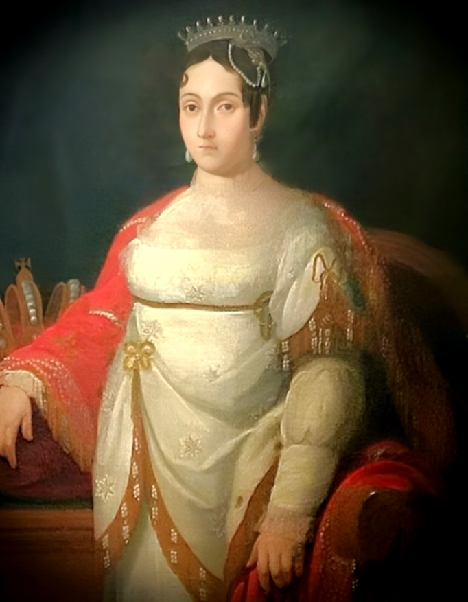 Emperatriz Ana María de México